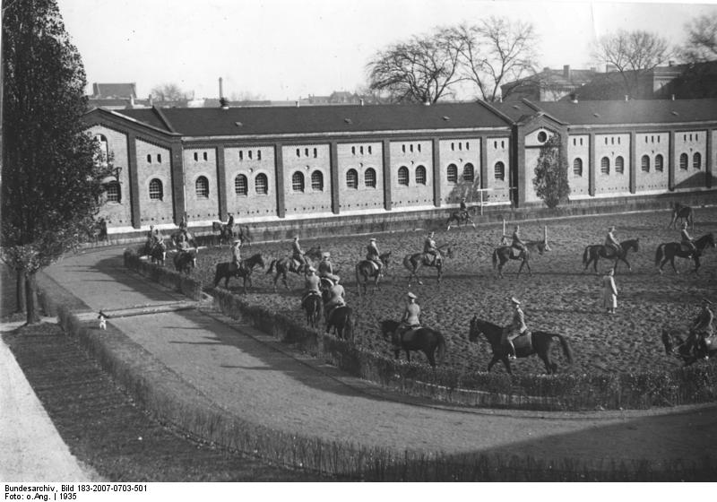 Berlin, Kriegsakademie, Reitbahn Scherl Bilderdienst Die Kriegsakademie, die Hochschule der Offiziere in Berlin Reitunterricht auf der Reitbahn der Akademie